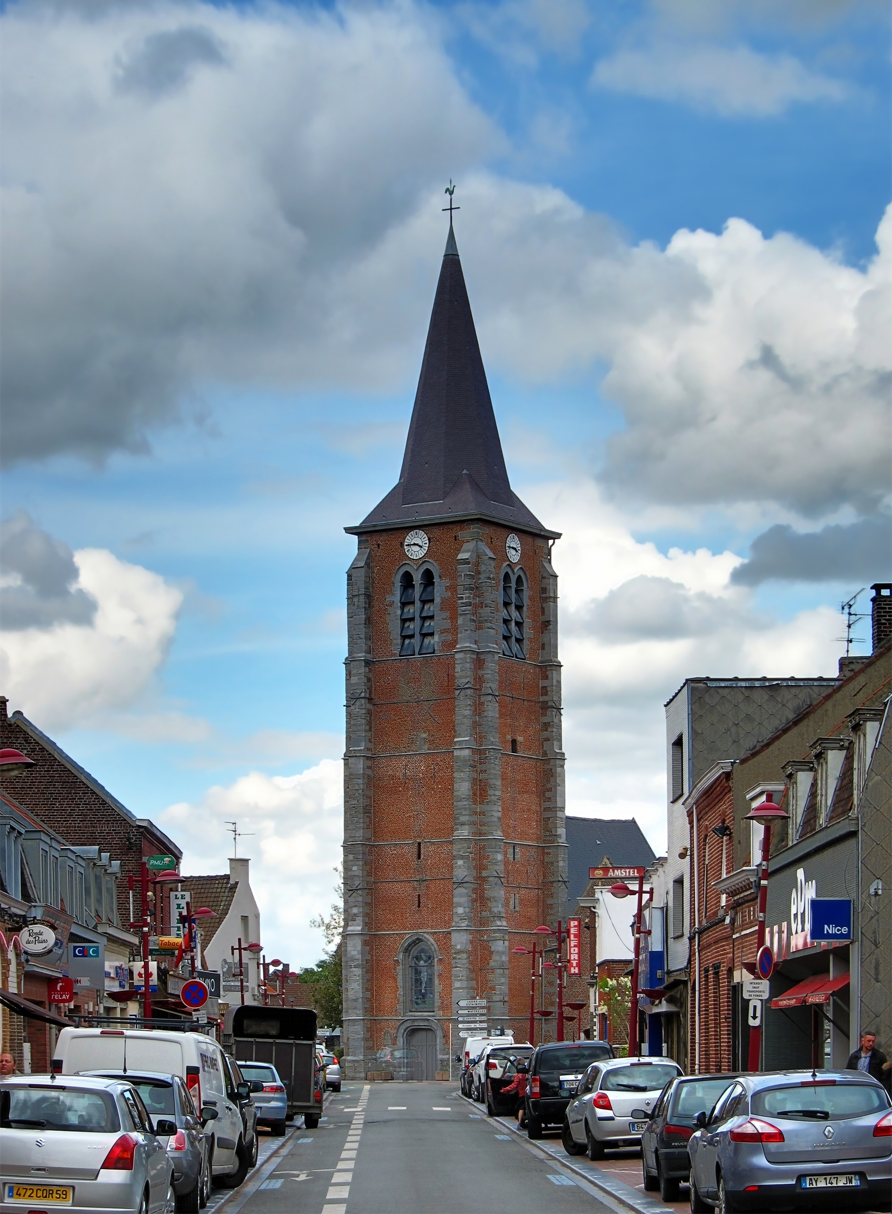 Le clocher de l'église Saint-Vaast de Leers (Nord).